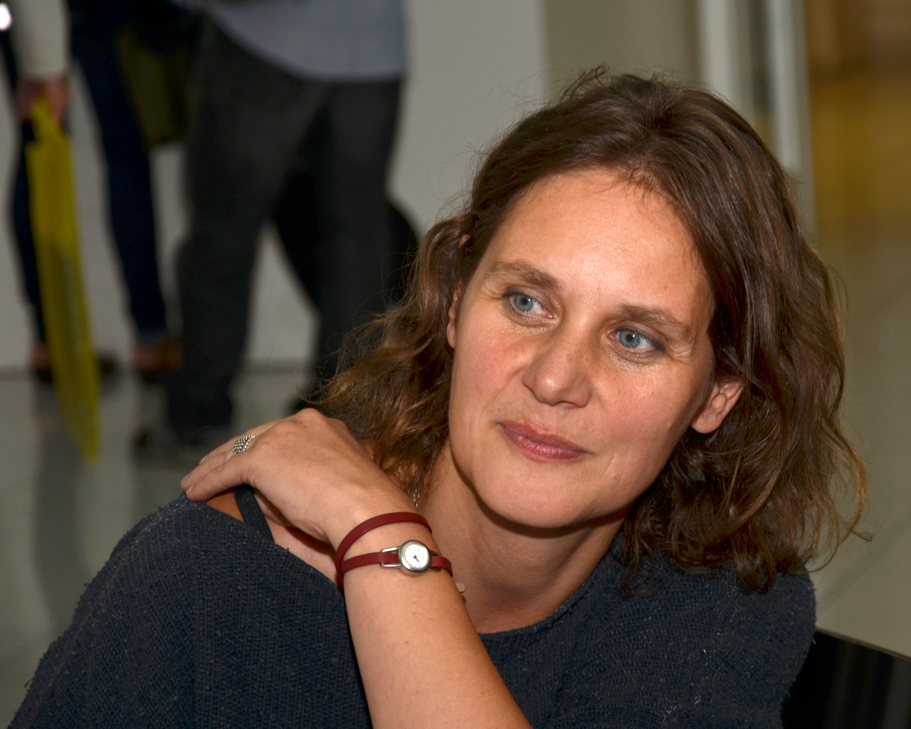 Adriana Primusová (2016)